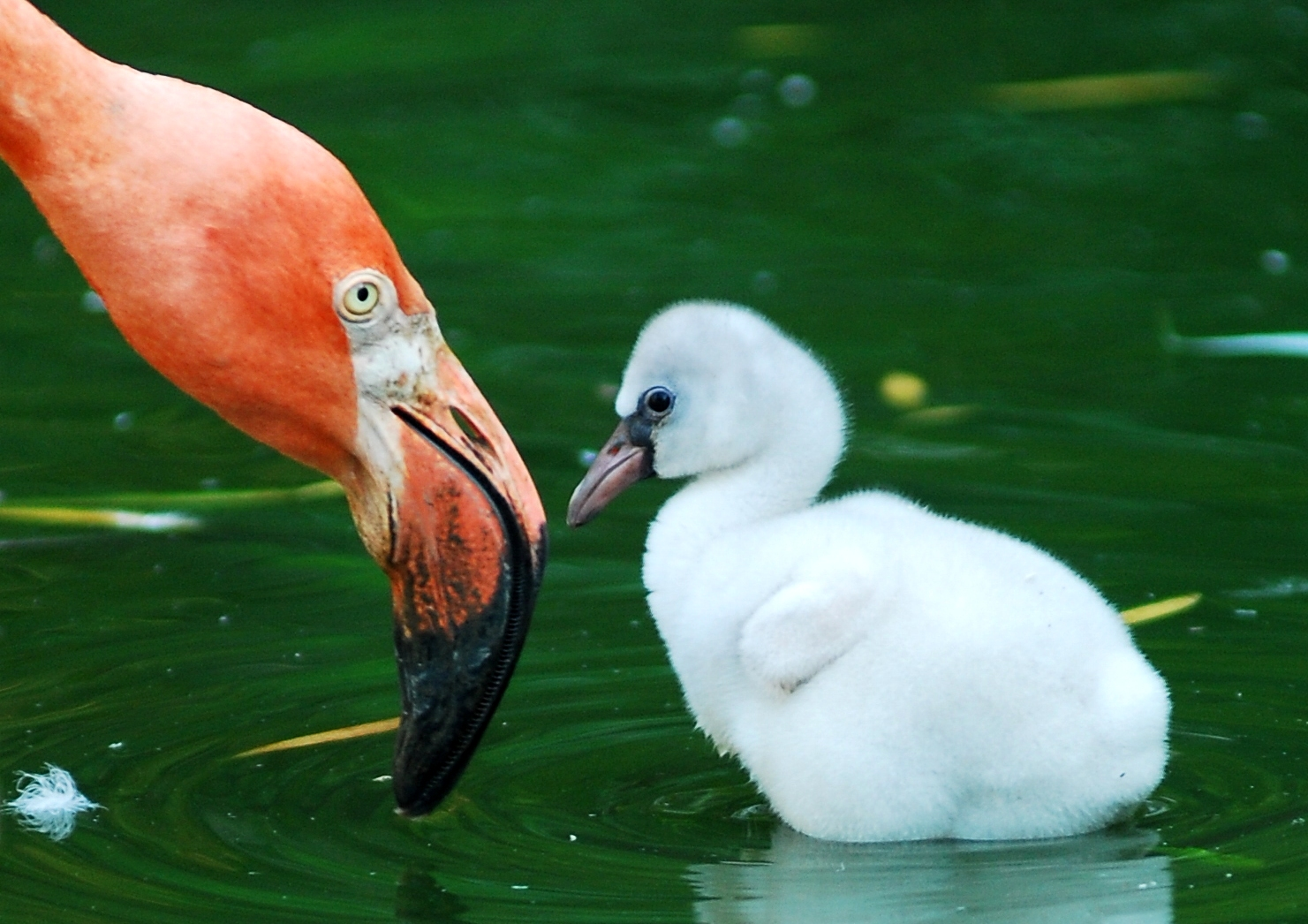 Plameňák kubánský a mládě